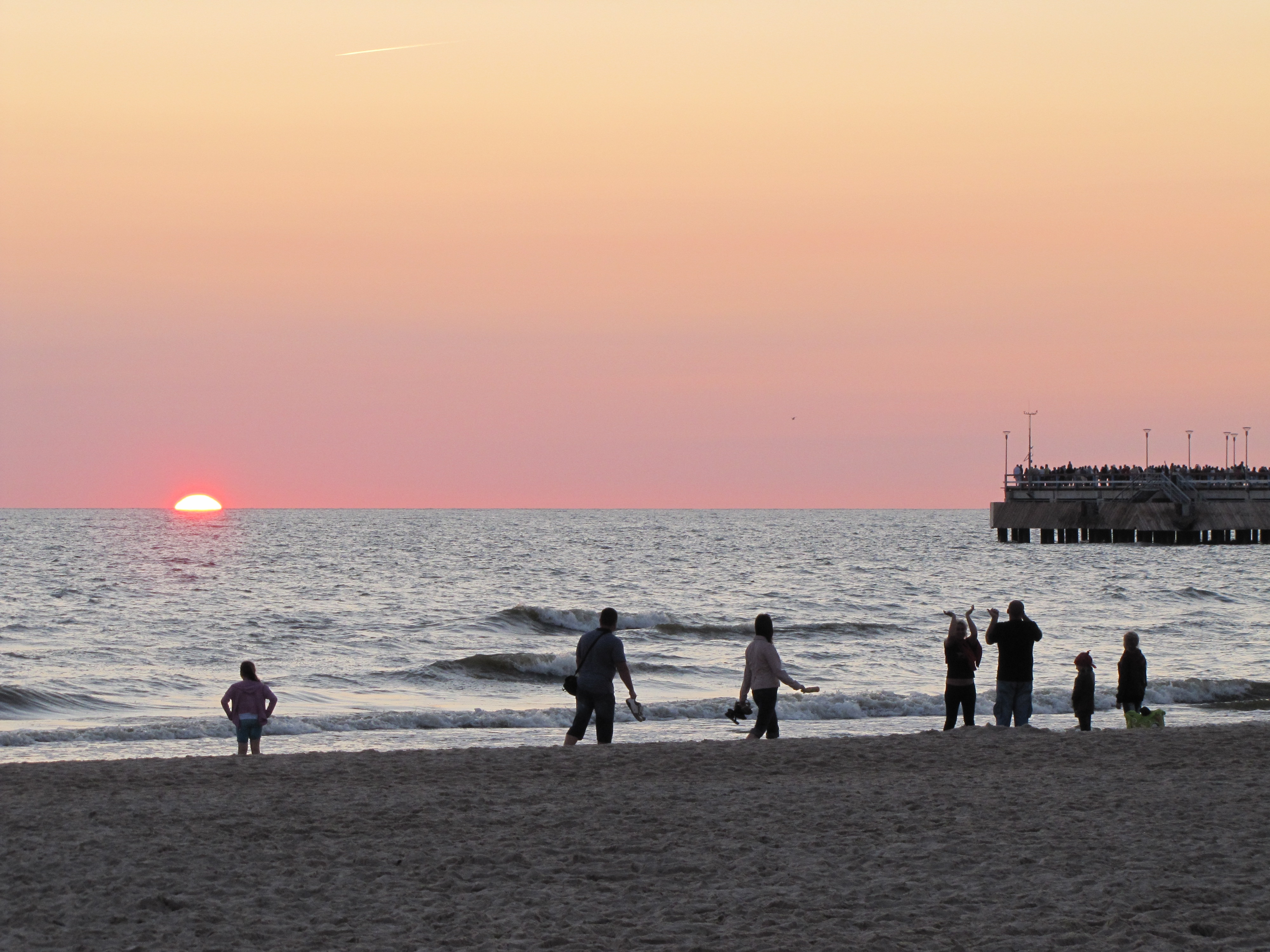 Saulėlydis Palangoje